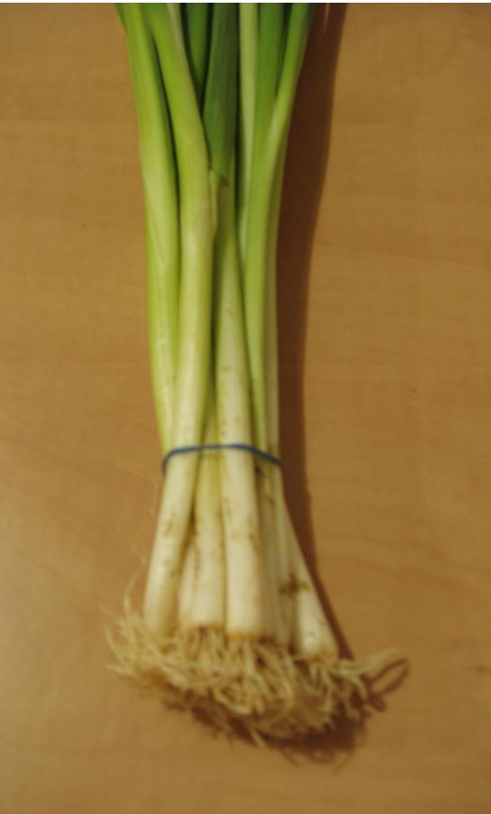 בצל ירוק כרוך בגומייה. צילם דוד שי.